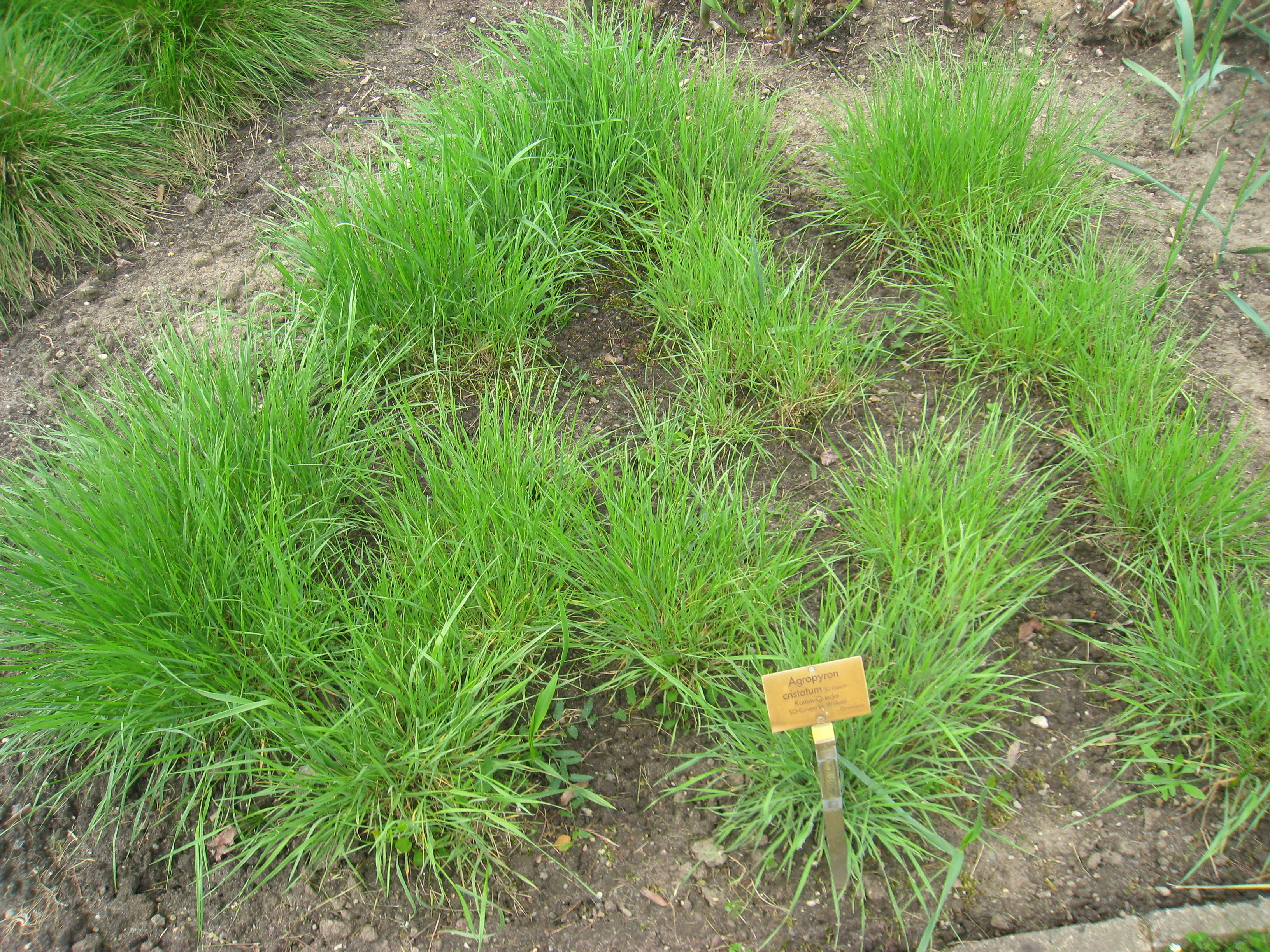 Agropyron cristatum specimen in the Botanischer Garten, Berlin-Dahlem (Berlin Botanical Garden), Berlin, Germany.